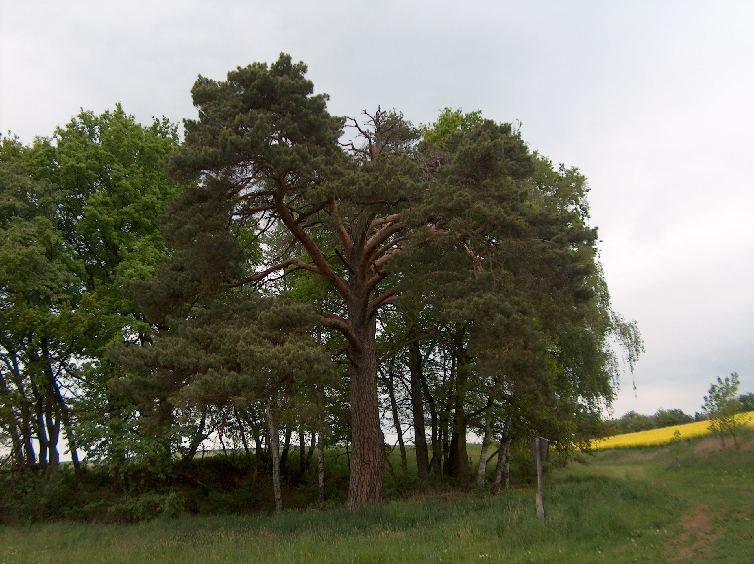 Památkově chráněná Šimonova borovice u Soběslavic - Liberecko